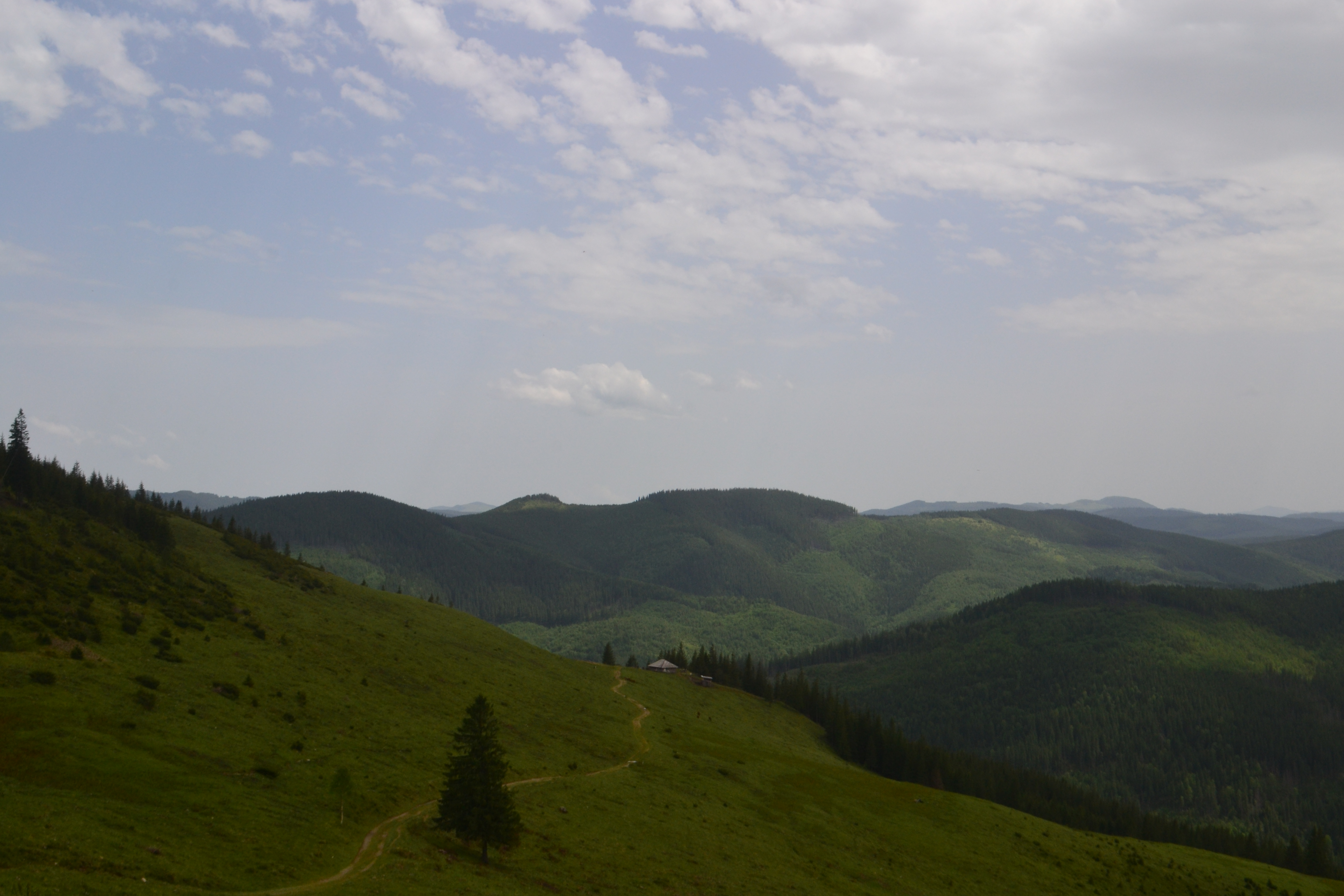 Полонина Прелучний